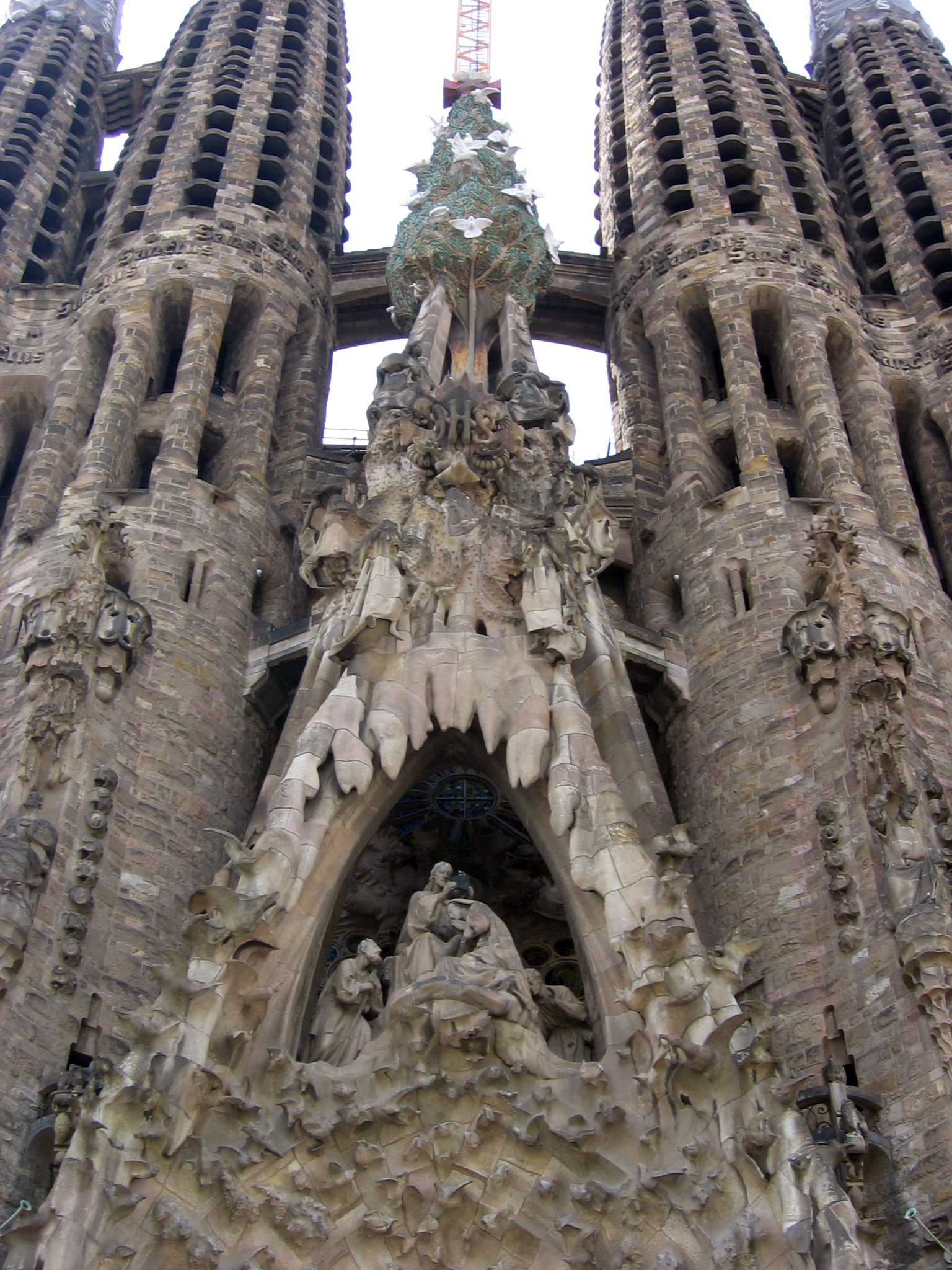 Sagrada Familia - Fachada del Nacimiento - Árbol de la Vida